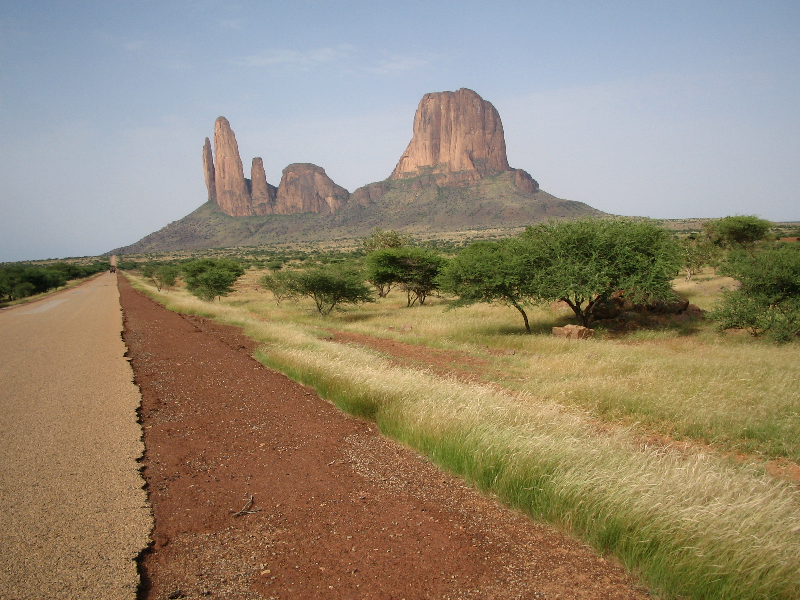 le main de Fatima, Hombori